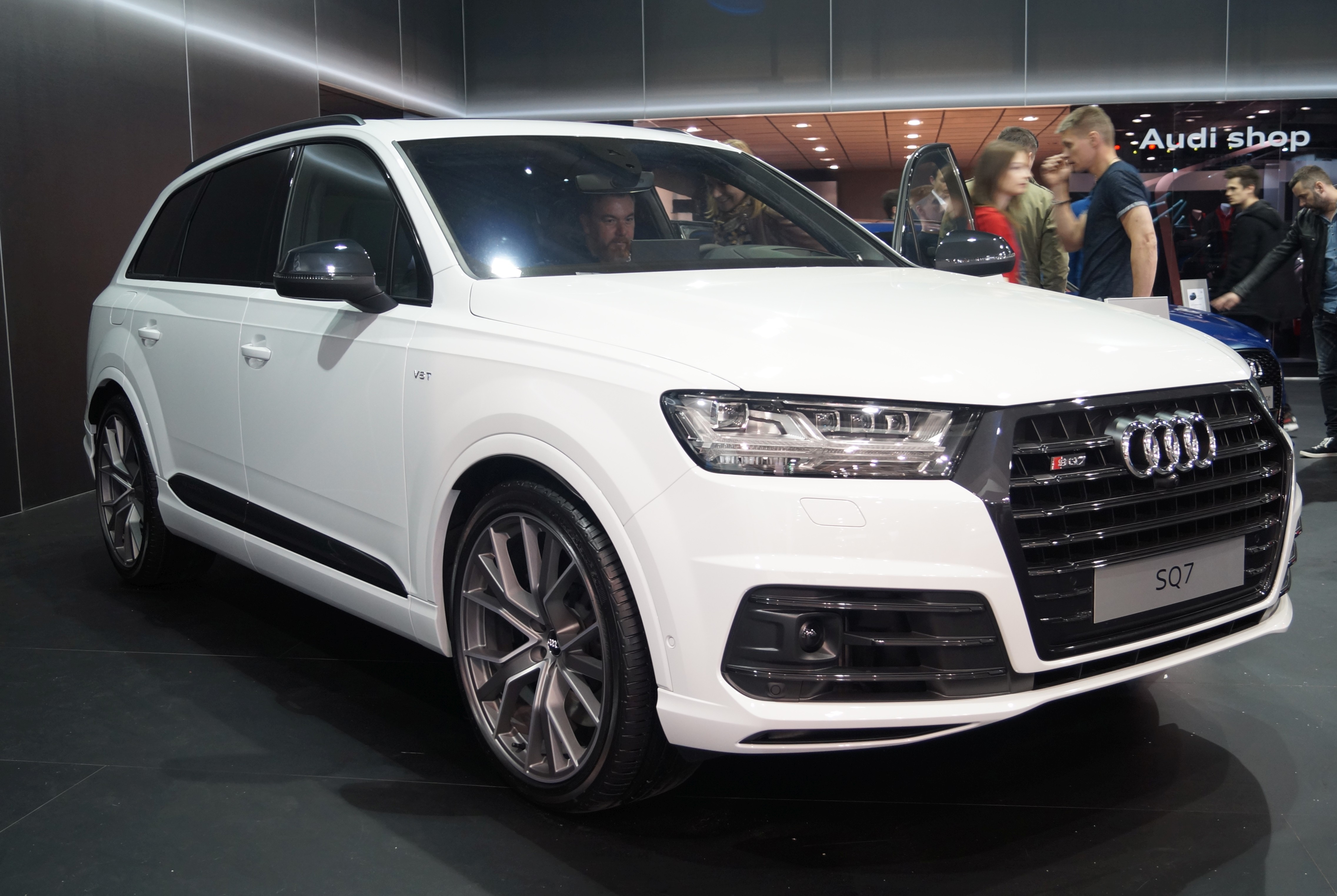 Prawy przód Audi SQ7 na Motor Show Poznań 2017.